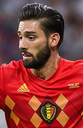 Потрясающий камбэк сборной Бельгии в матче с Японией